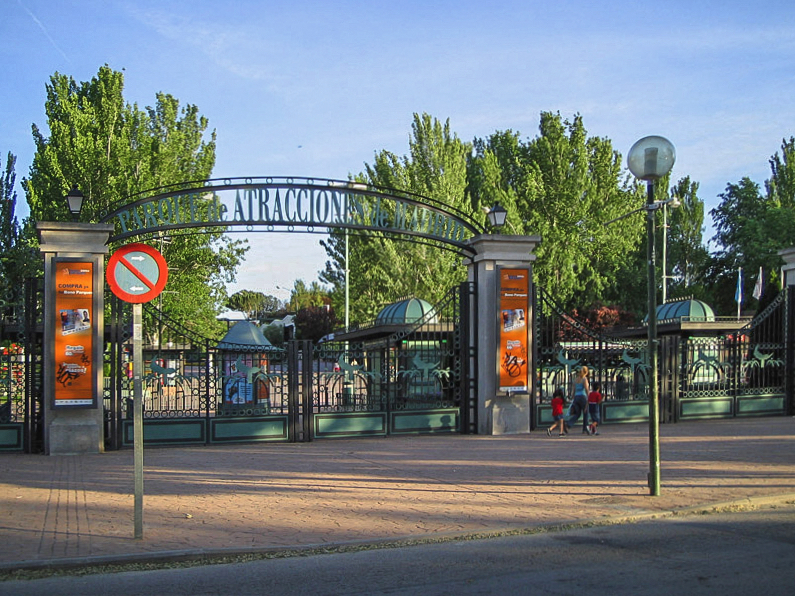 Parque de Atracciones de Madrid in Spain